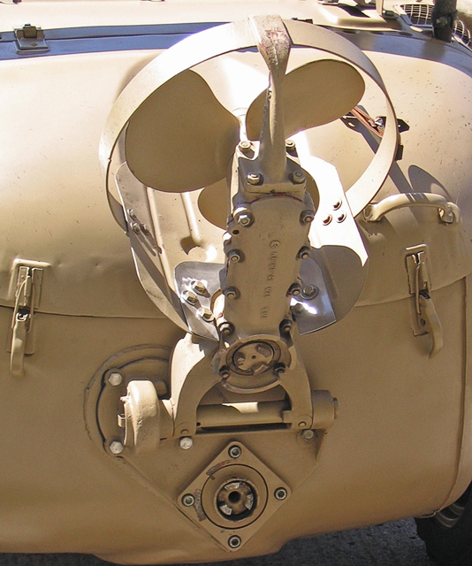 Beschreibung: VW Schwimmwagen / Schraube / propeller. Beachte die Antriebskupplung mit den 3 Nasen. Fotograf: Darkone, 2. Juli 2005